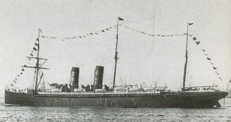 RMS Umbria